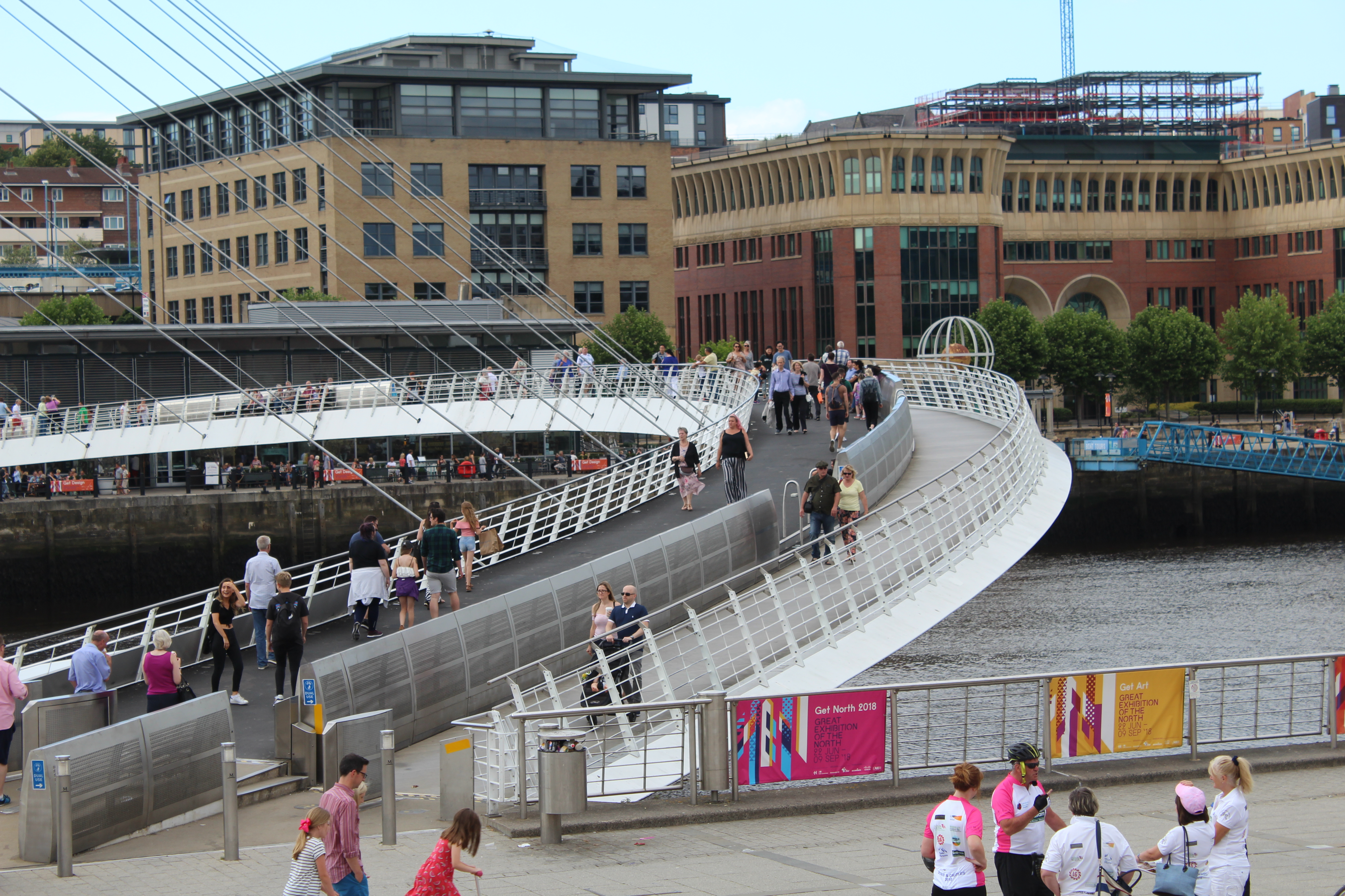 Pont du millénaire de Gateshead.